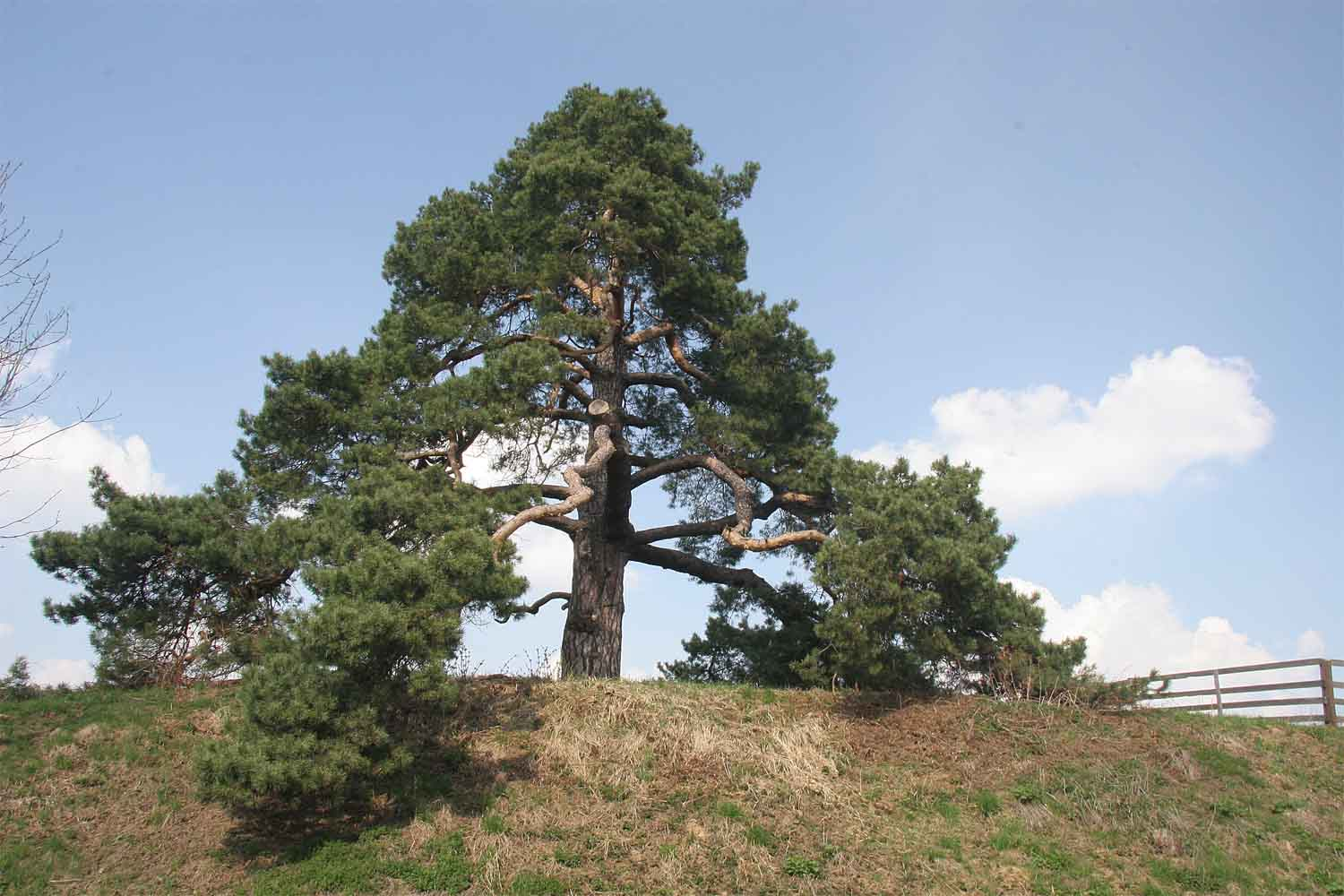 Památná Svídnická borovice